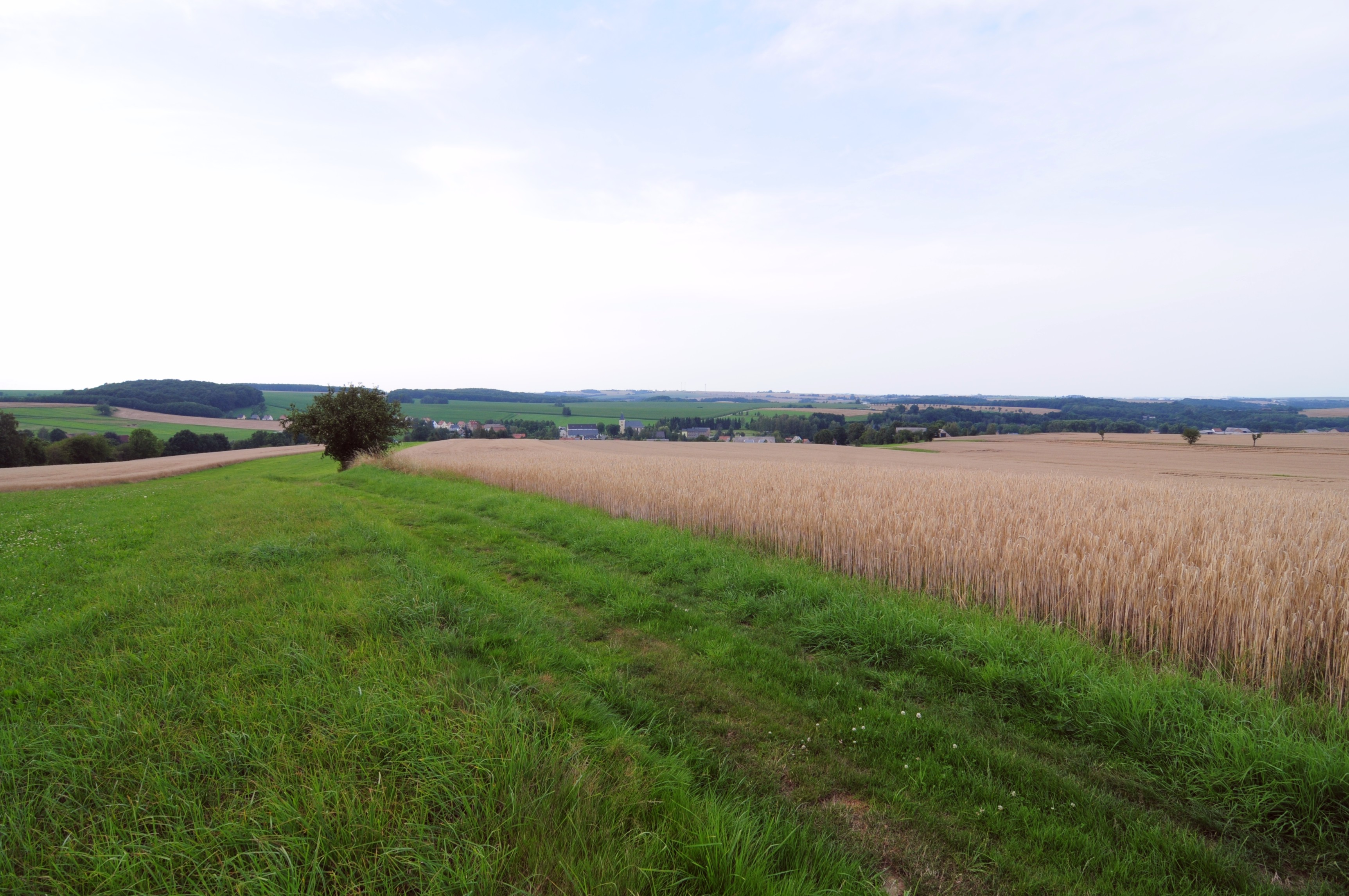 Marbach bei Nossen, Blick in Richtung Nordwesten (Gemeinde Striegistal, Sachsen, Deutschland)